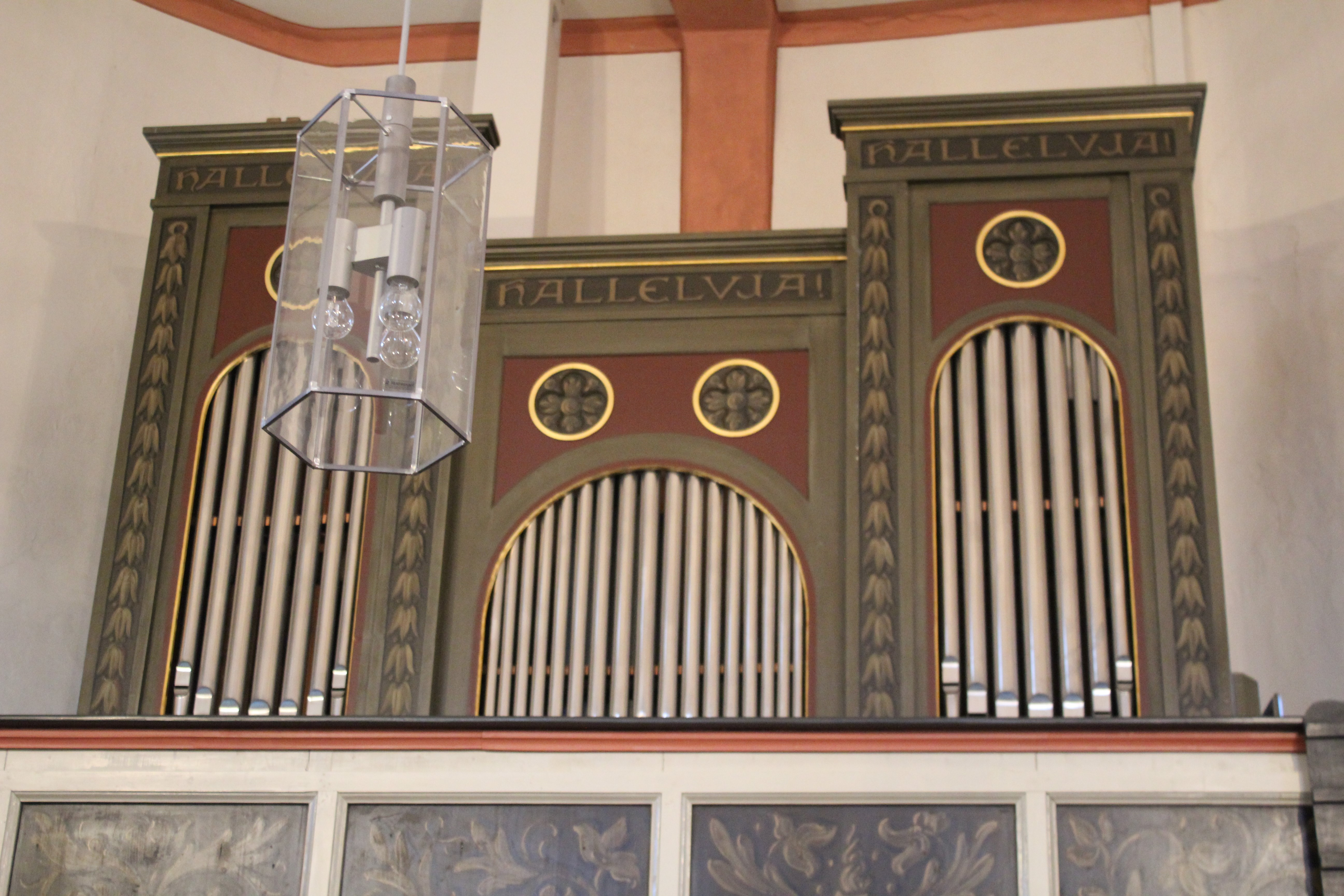 Evangelische Kirche Sellnrod, Gemeinde Mücke, Vogelsbergkreis, Hessen, Deutschland